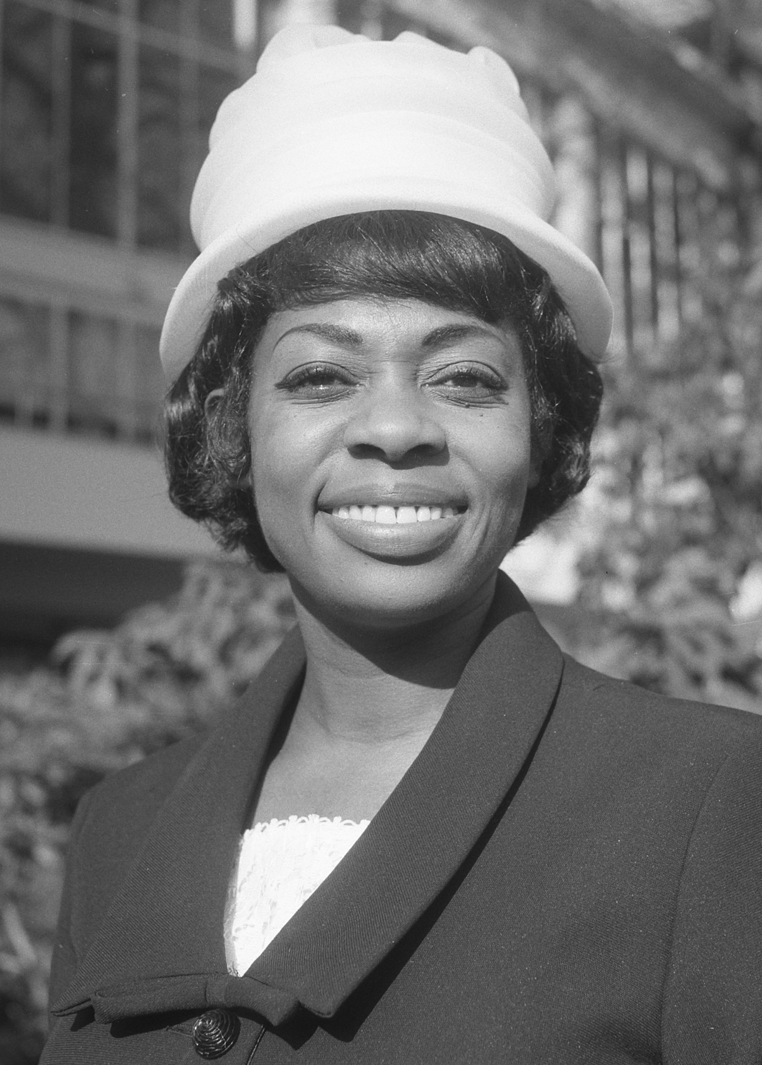 Amerikaans-Belgische jazz-zangers in Kijk de Rijk Show , Donna Higtower na de persconferentie (kop)